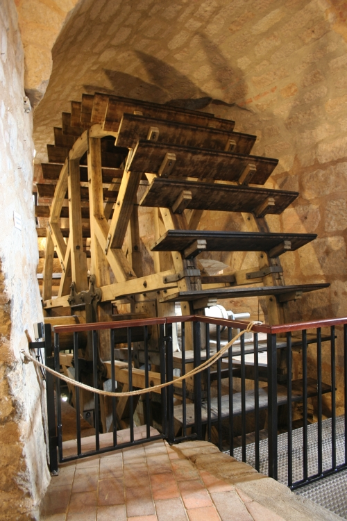 Replika vodního kola ve vodárenské věži, která je součástí prohlídkového okruhu Plzeňského historického podzemí.